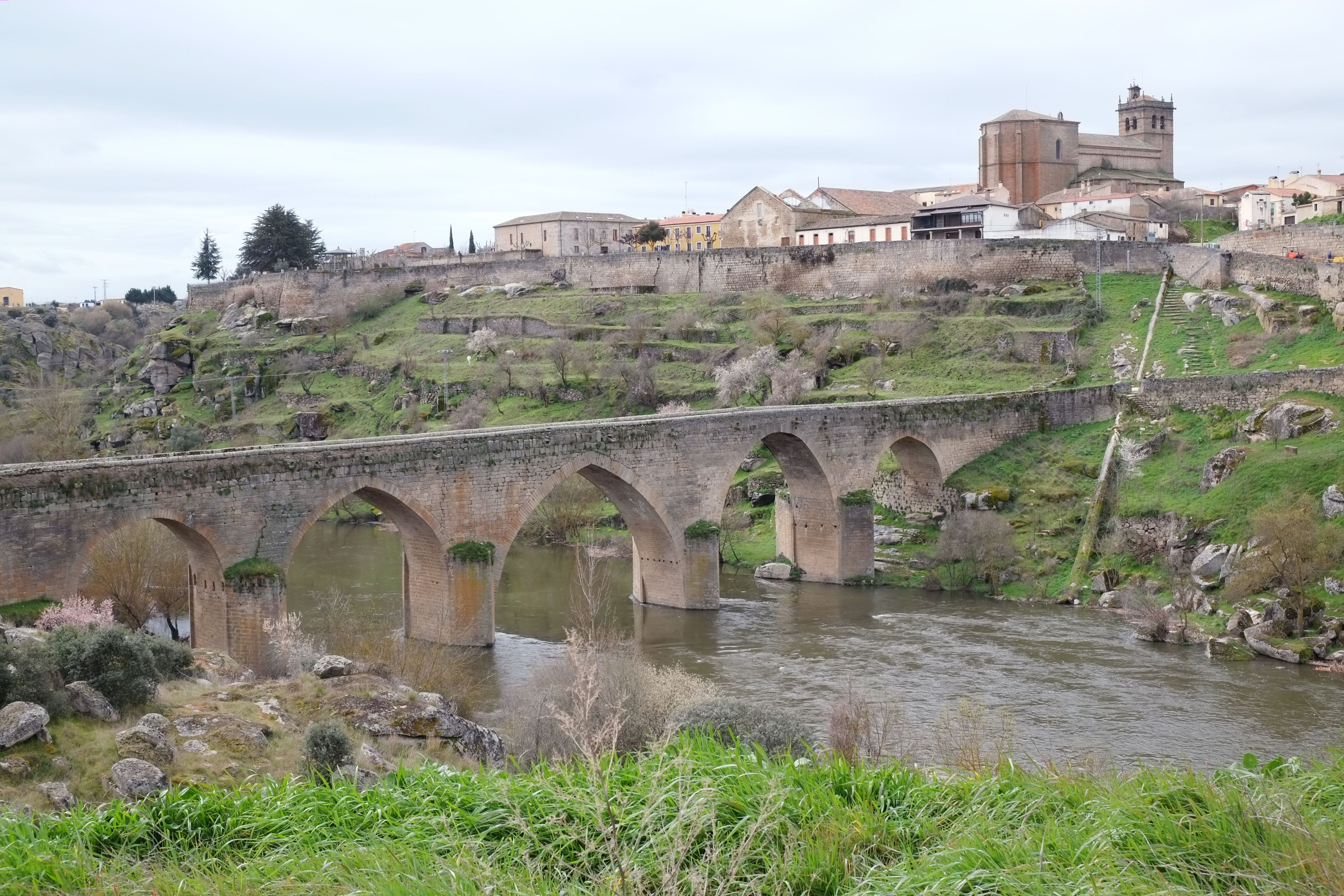 Brücke in Ledesma in der Provinz Salamanca (Spanien)